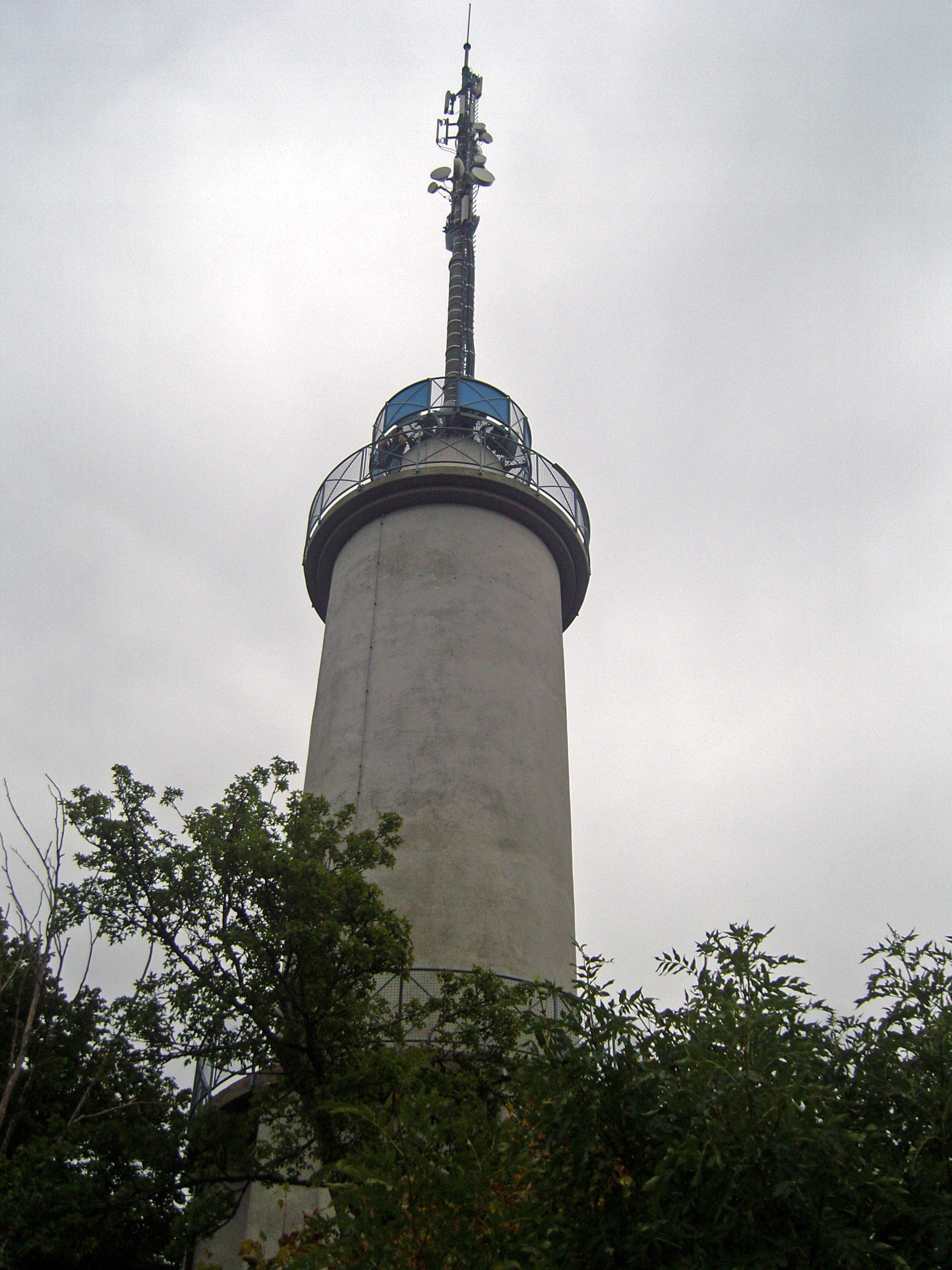 Schlossbergturm Ebingen